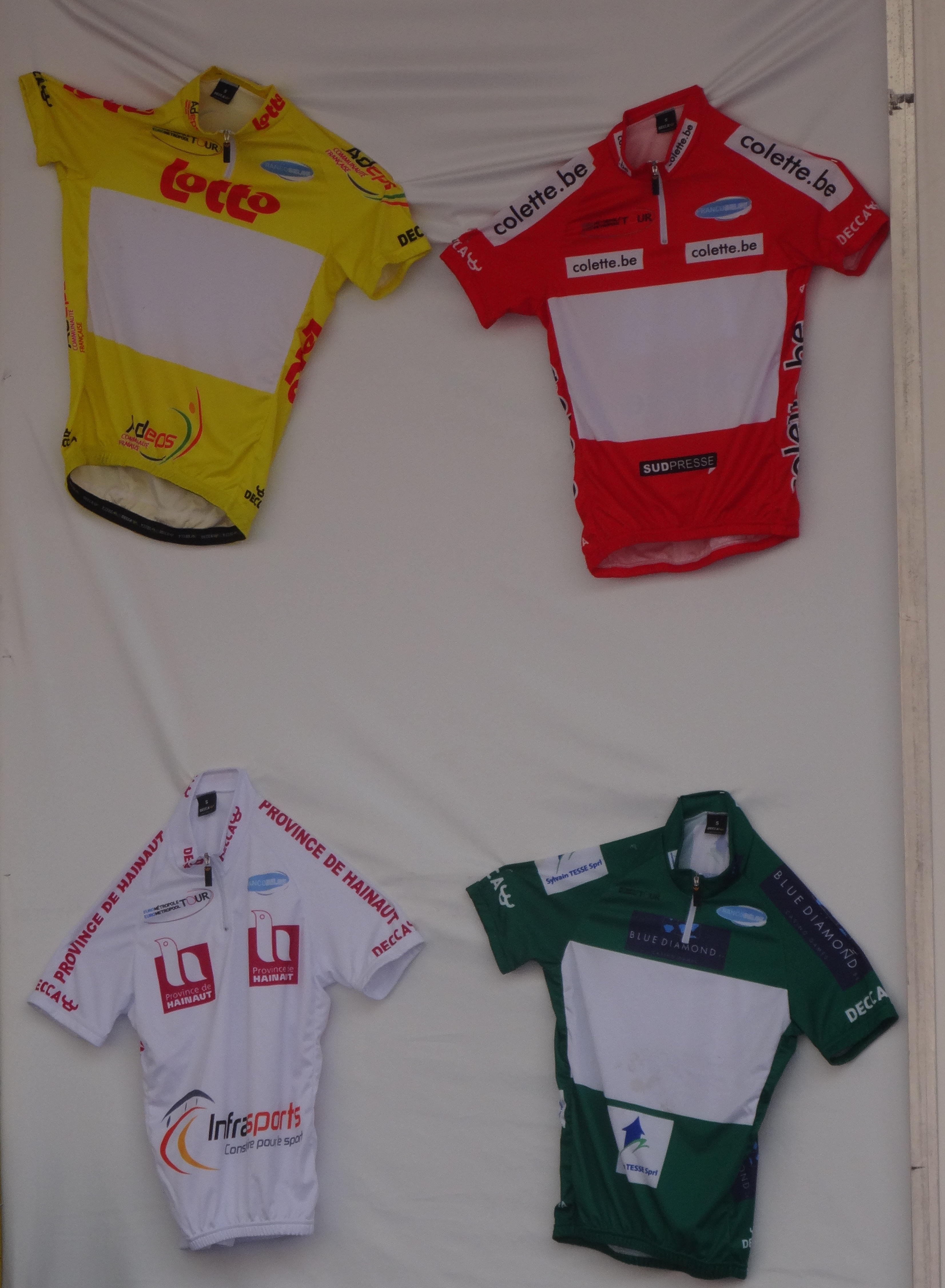 Reportage photographique réalisé le octobre à l'occasion de l'arrivée de la première étape de l'Eurométropole Tour 2014 à Bissegem (Courtrai), Belgique.